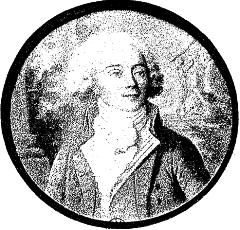 Félix Desportes (1763-1849) - reproduction d'une miniature de la fin du XVIIIe siècle (vers 1792)